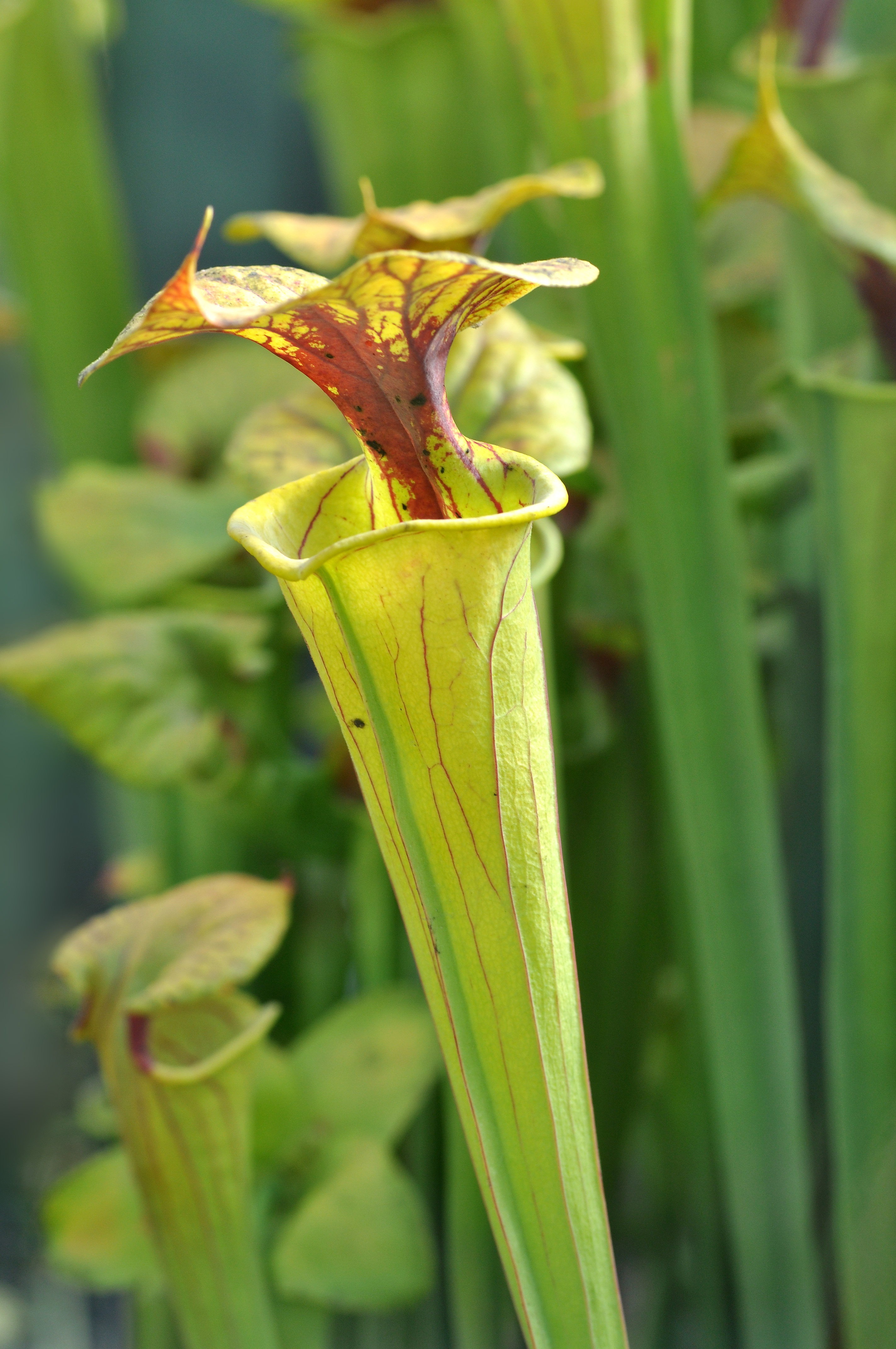 Sarracenia flava